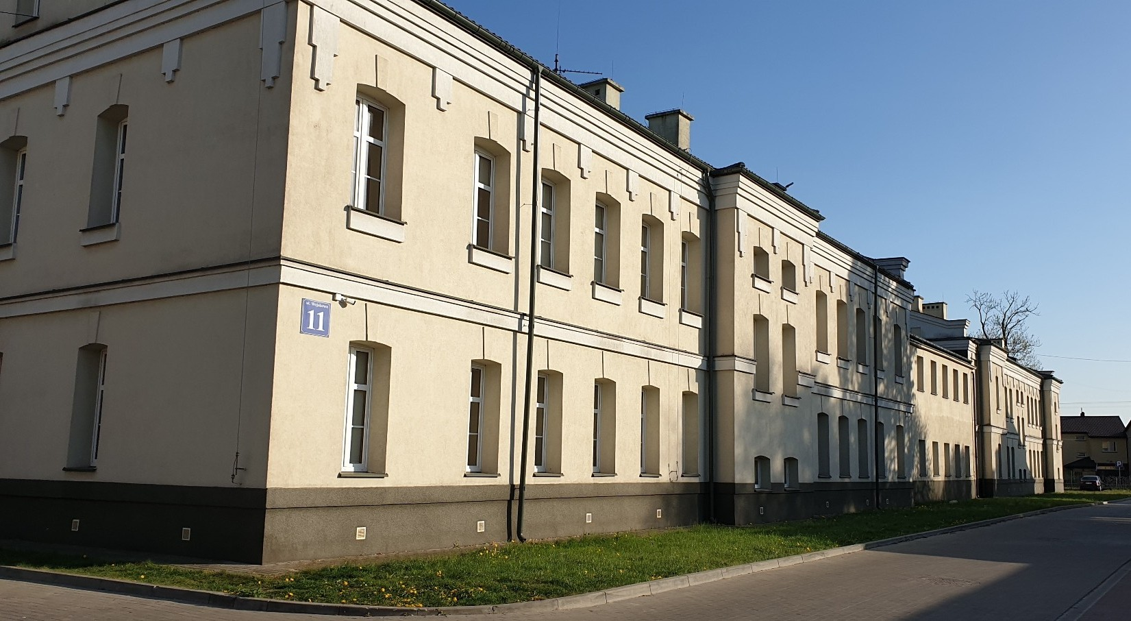 Internat garnizonu Przasnysz